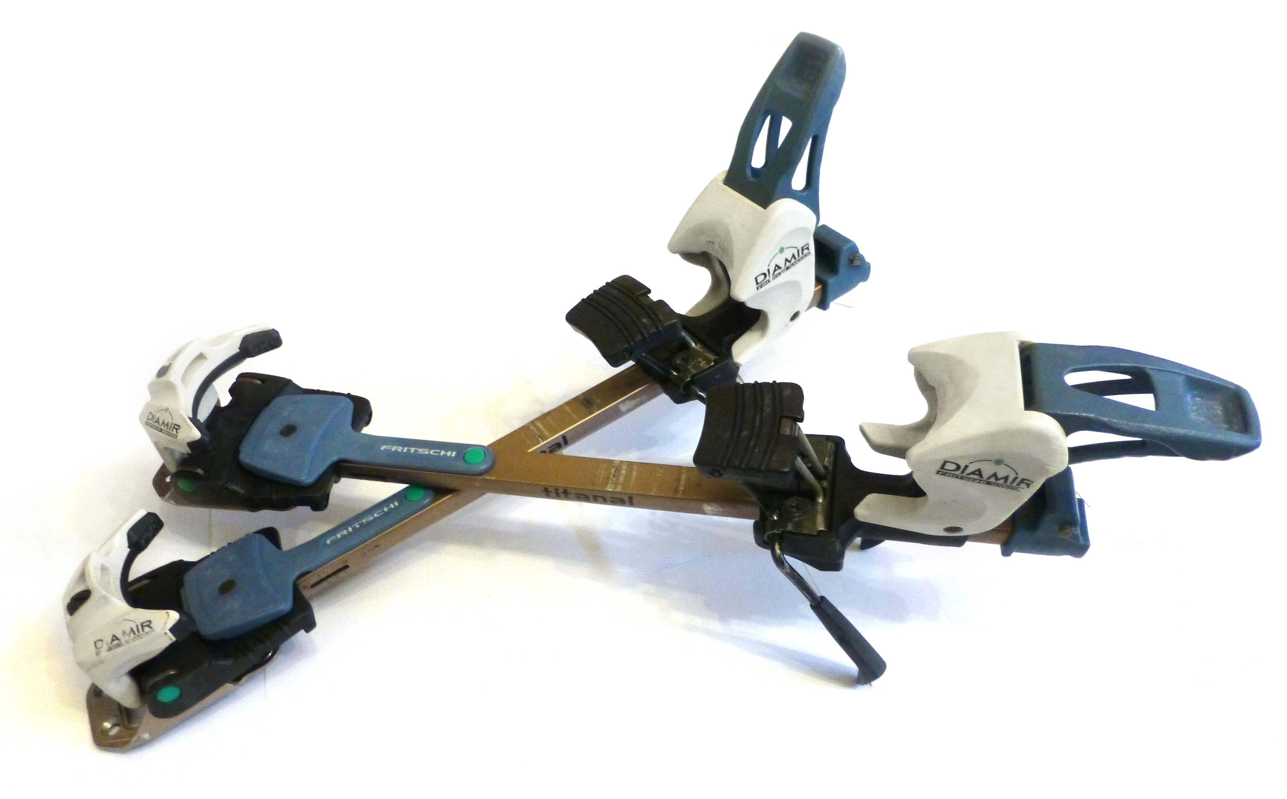 Tourenbindungen von Diamir Fritschi Titanal